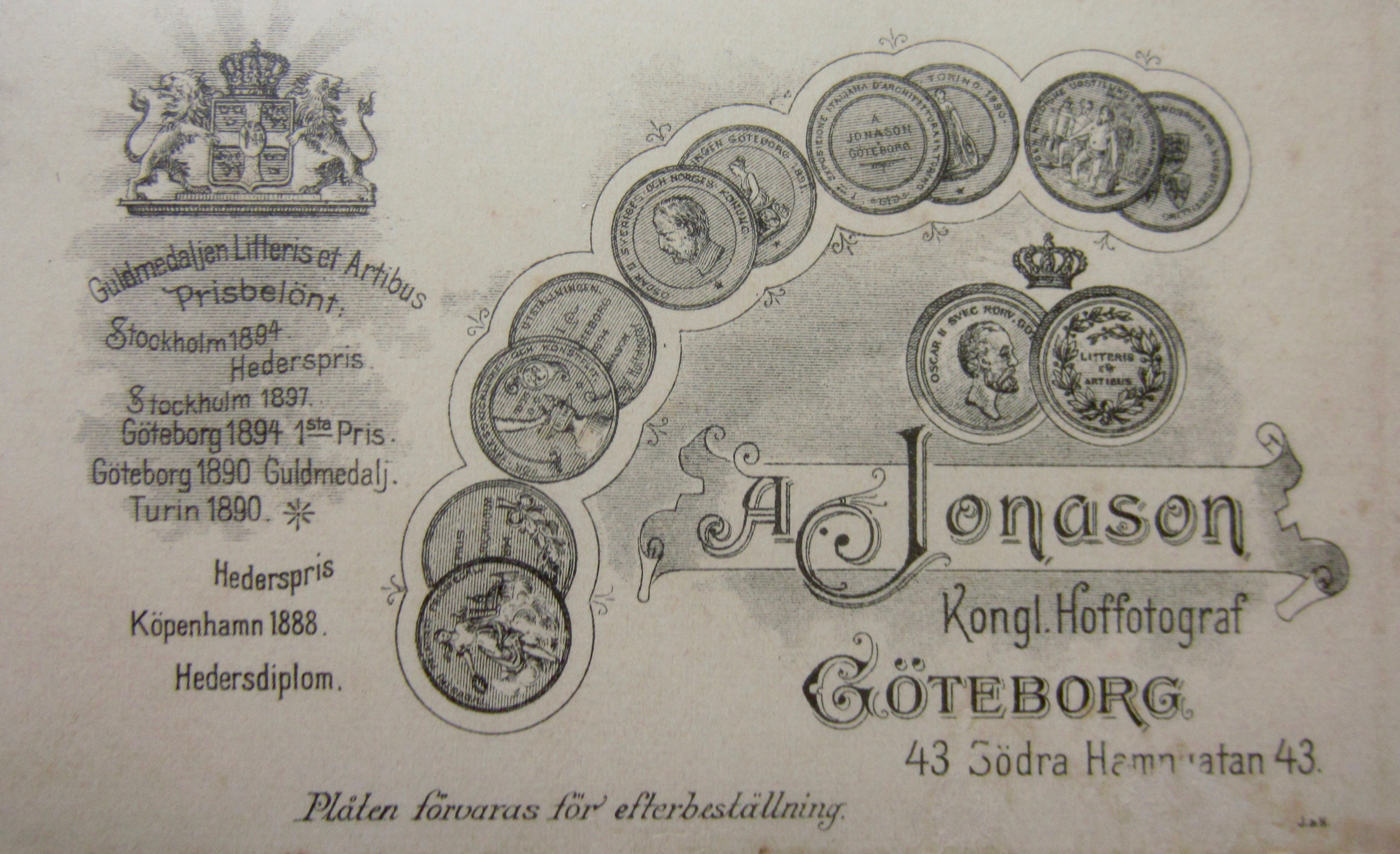 Baksida av ateljéfoto tryckt före 1915 för: Aron Jonason (1838–1914), Kongl. Hoffotograf, Göteborg, 43 Södra Hamngatan 43